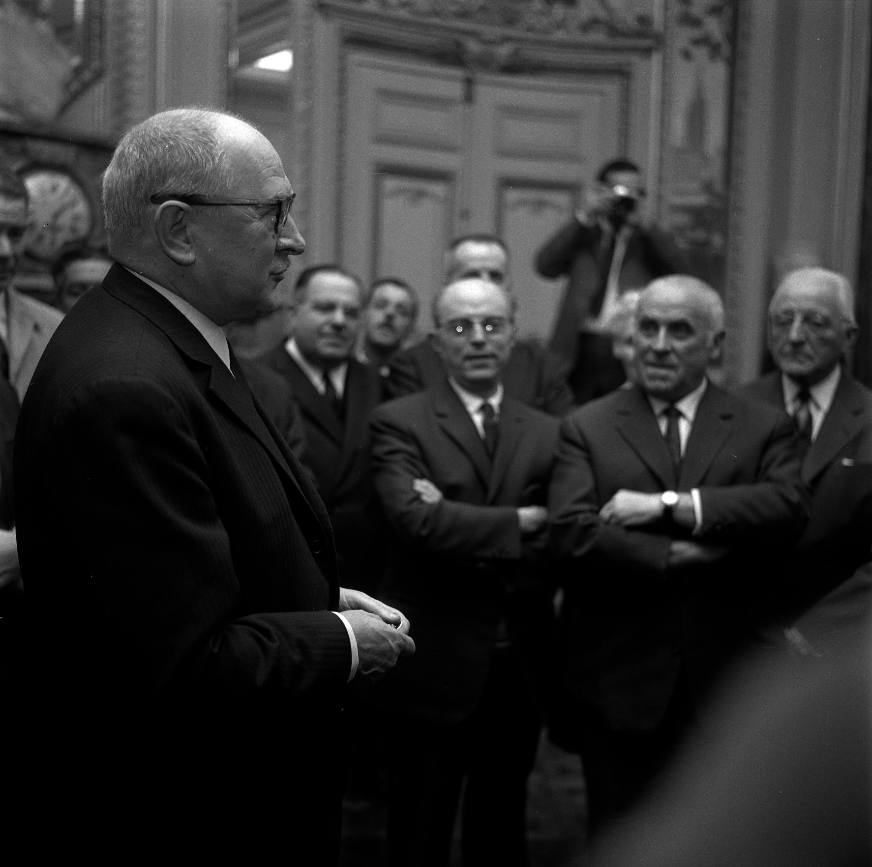 Salle du Capitole. Le 25 Avril 1969. Vue de Guy Mollet lors d'une réception dans une salle du Capitole.